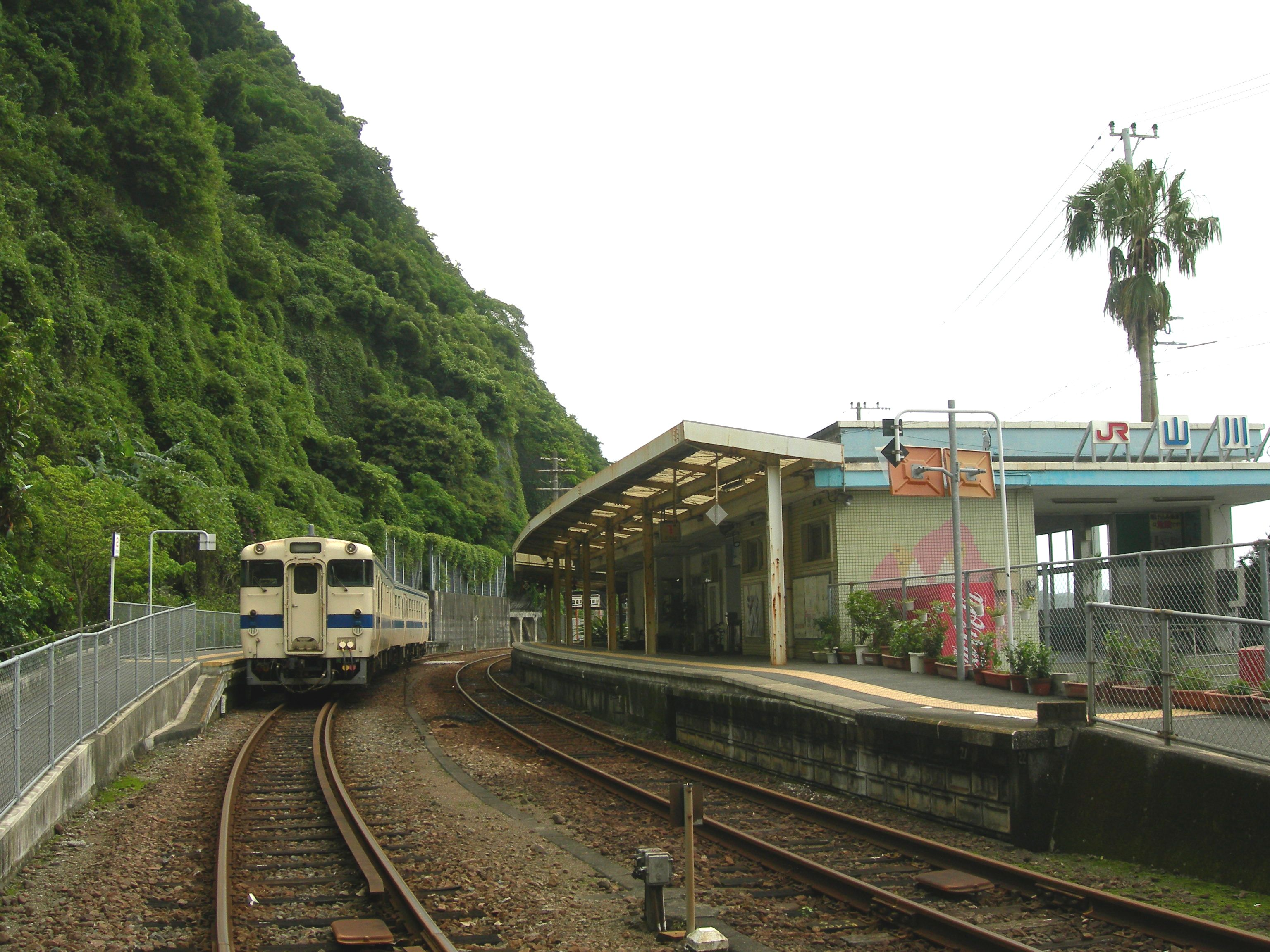 山川駅（やまかわえき）ホーム